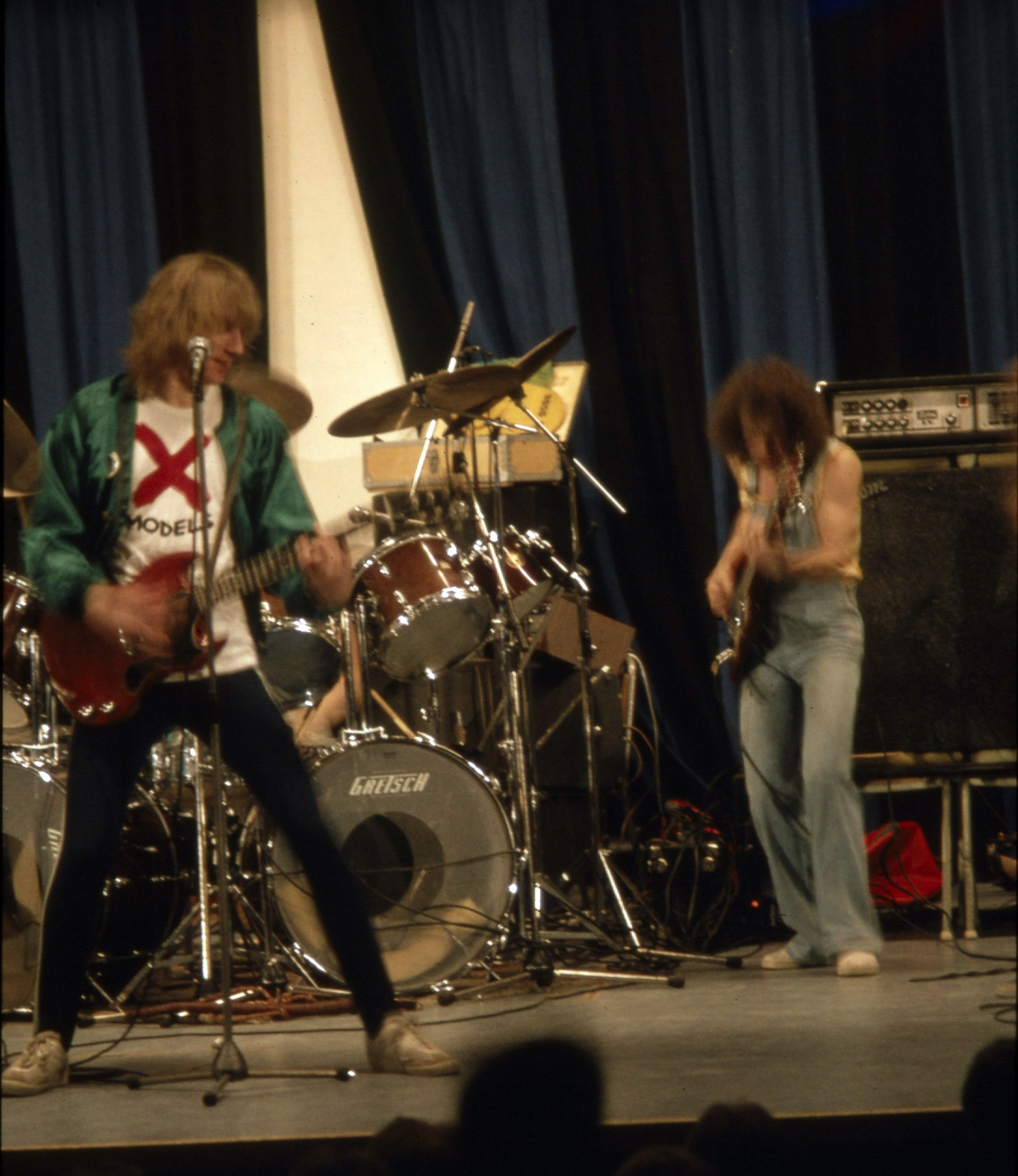 Wasa Express i Växjö, februari 1979